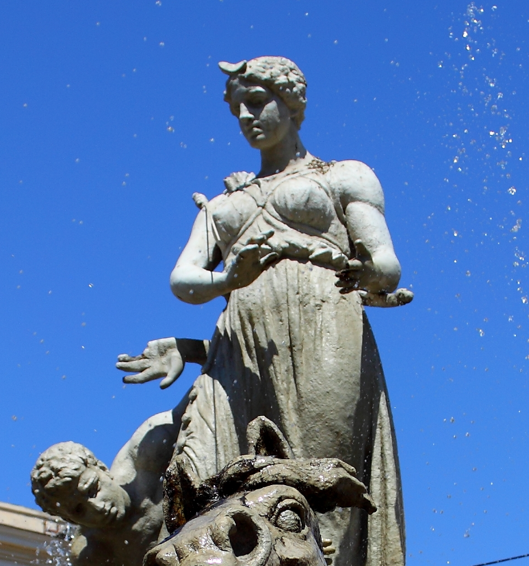 Opera derivata dall'immagine